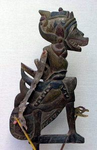 Menak Jinggo, Wayang Klitik aus Ostjava, Spielfigur aus den Damarwulan-Erzählungen. / Menak Jinggo aus den Damarwulan-Erzählungen, Wayang Klitik aus Ostjava, ca. 1910.